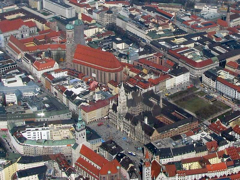 Luftbild München Marienplatz Rathaus Frauenkirche Liebfrauendom Foto April 2009 © Wolfgang Pehlemann Wiesbaden IMG_1332